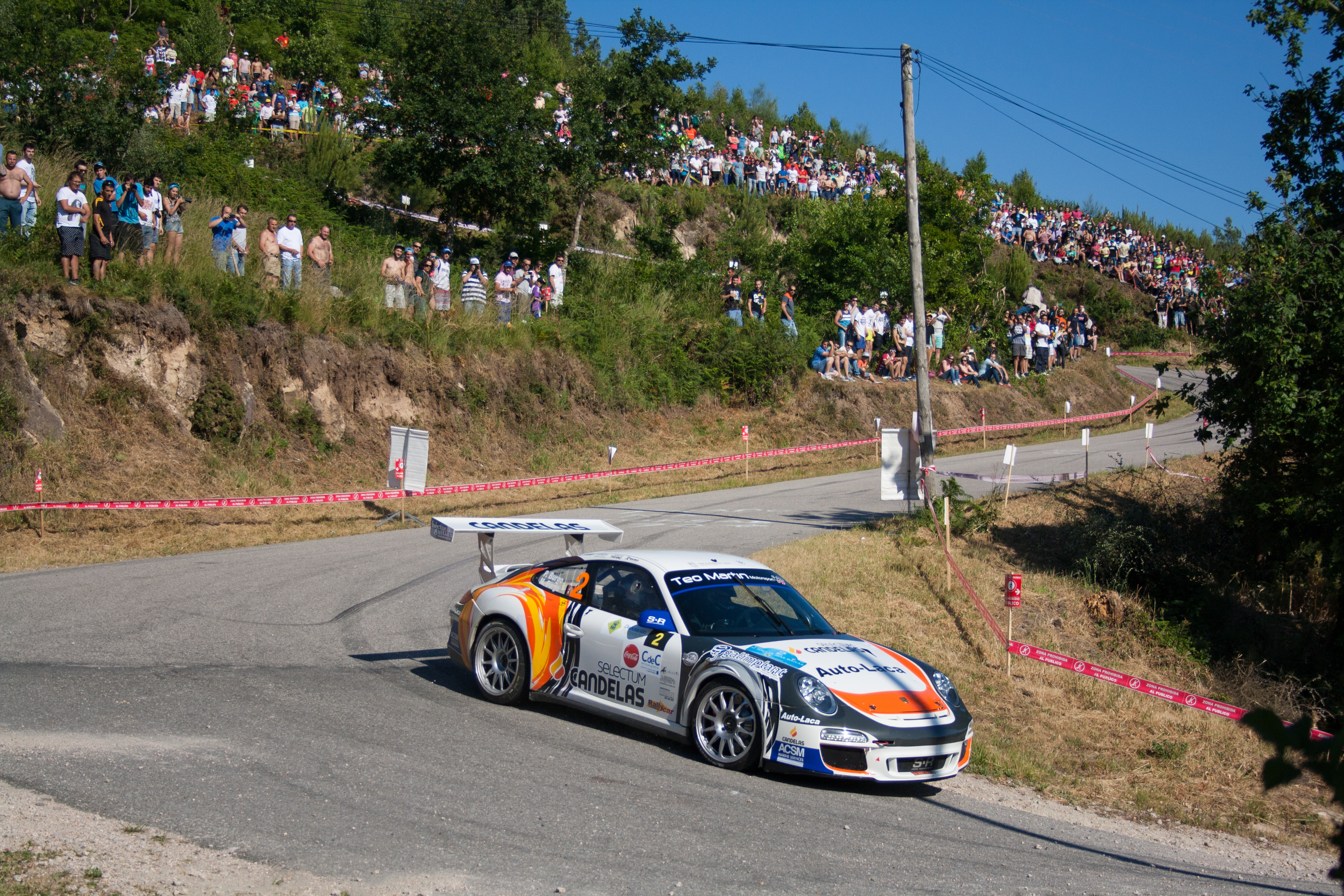 TC 2-4 (Nigrán)